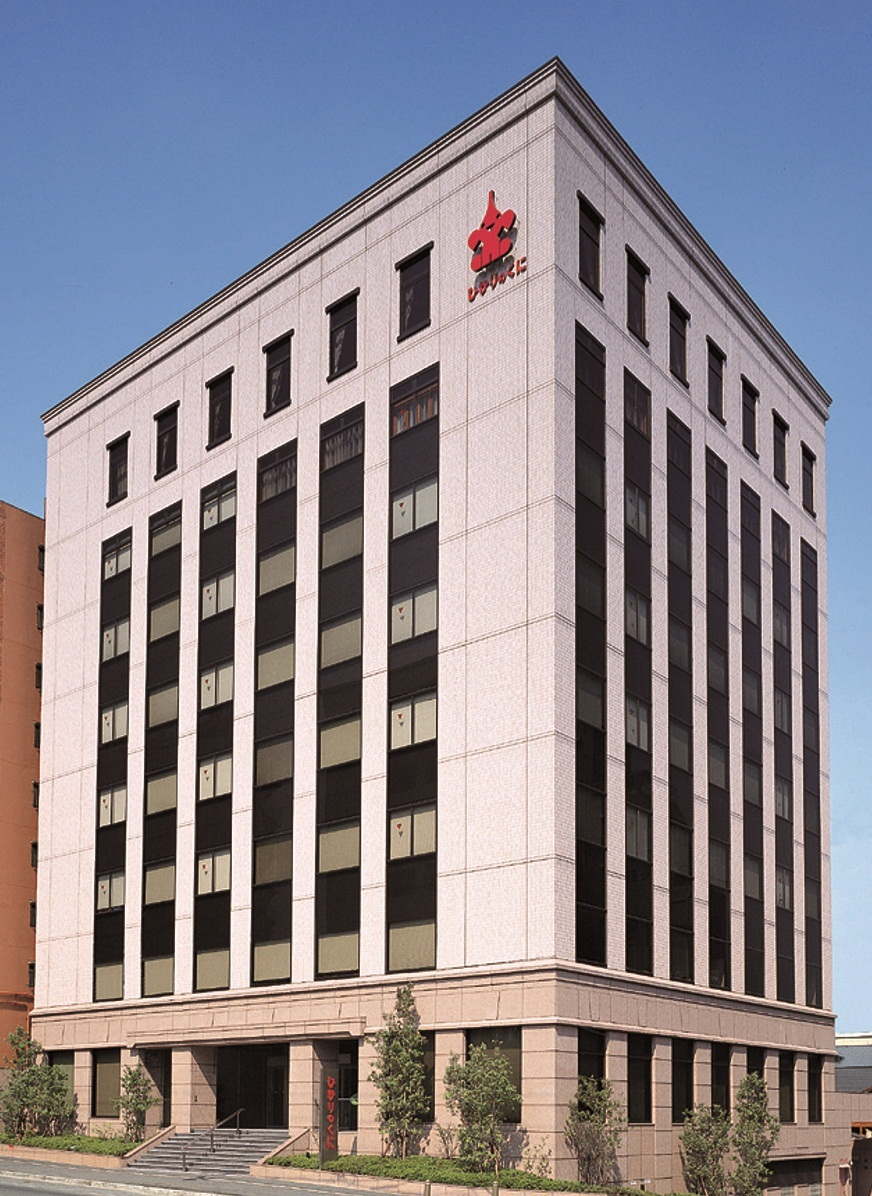 ひかりのくに本社